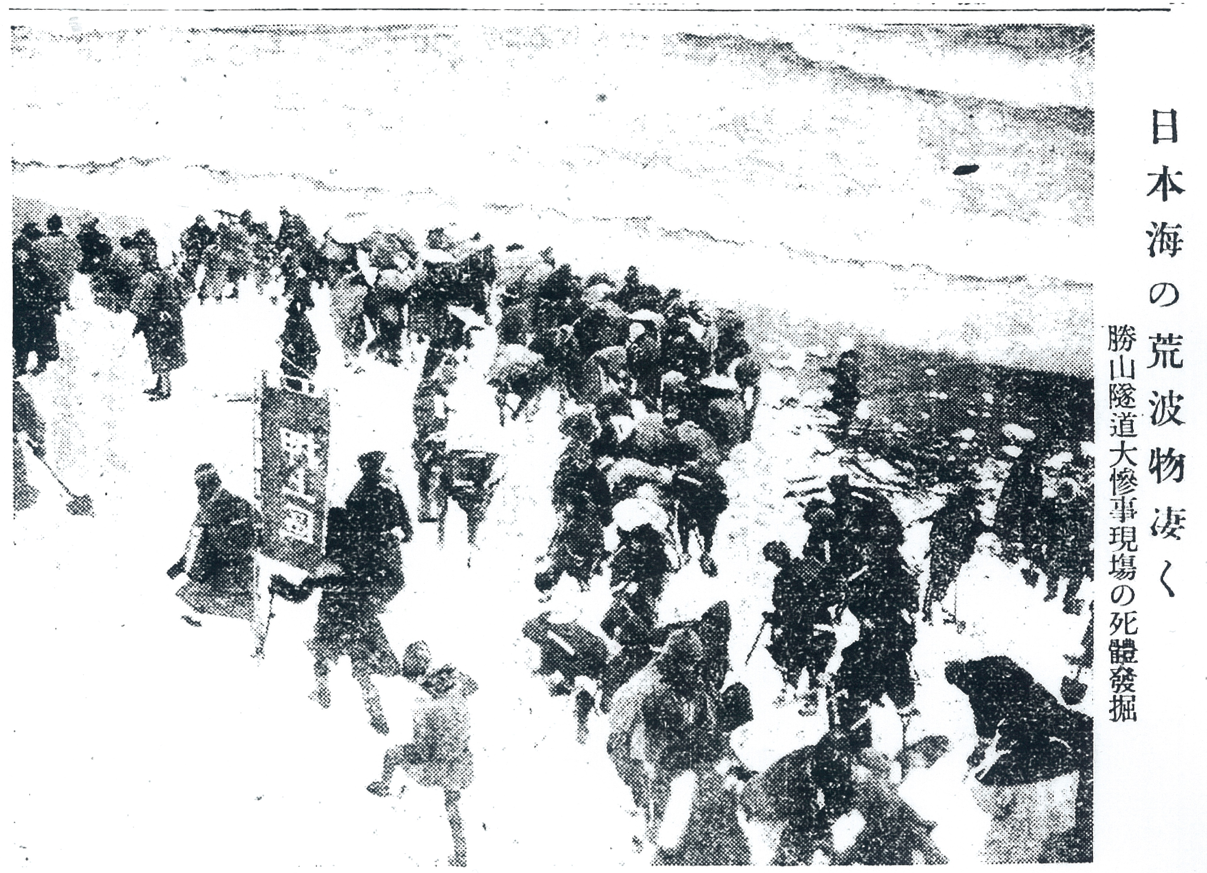 北陸線列車雪崩直撃事故の犠牲者を探す捜索隊 東京朝日新聞大正11年2月7日2面